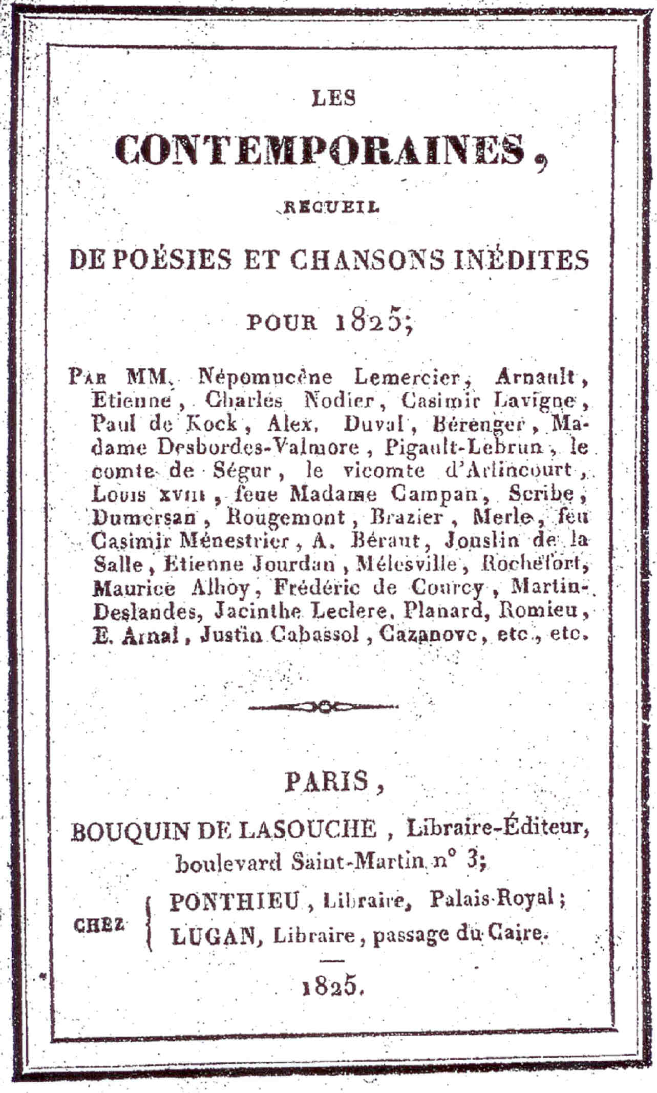 Couverture d'un recueil de chansons